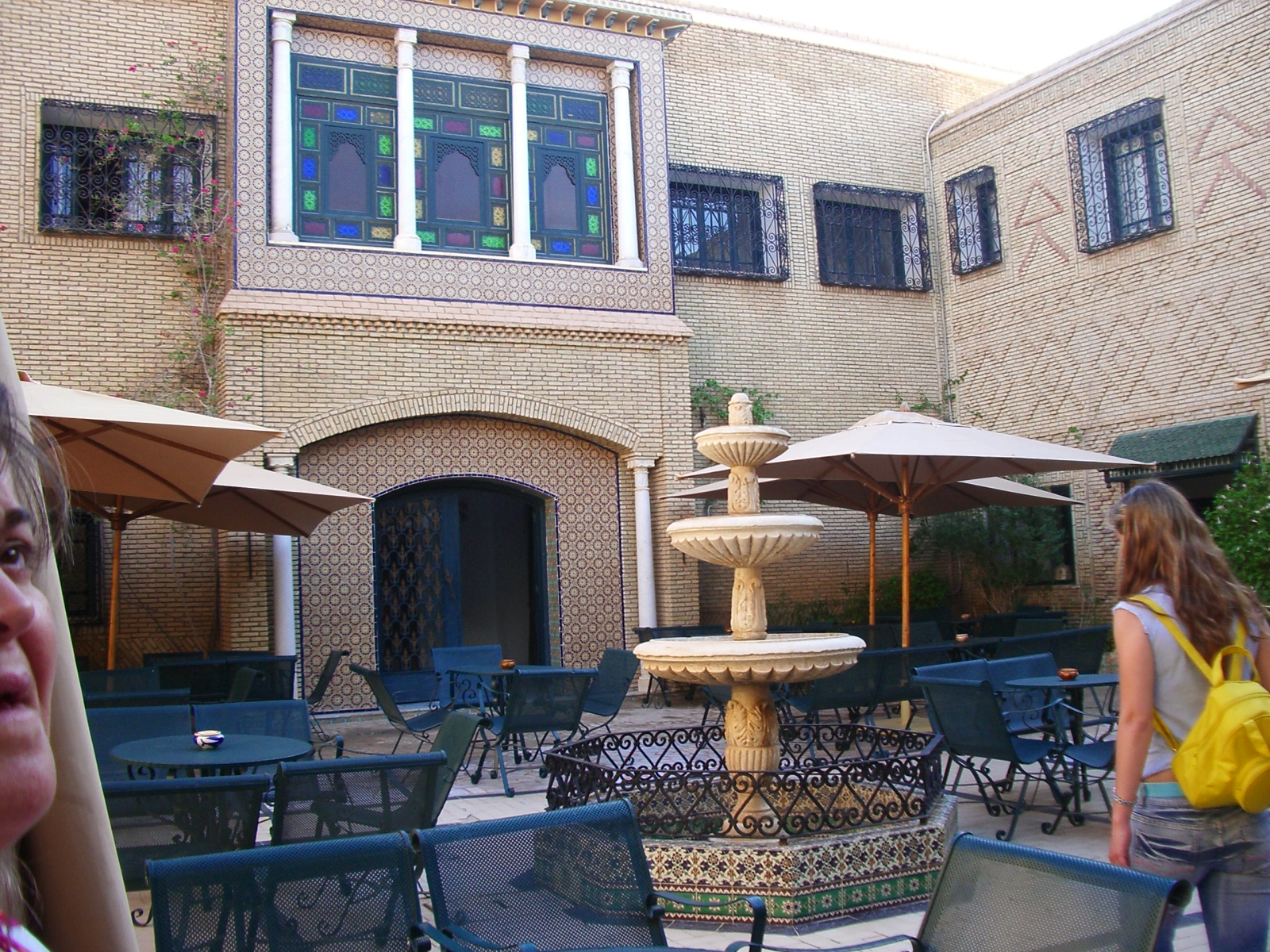 Museu Dar Cherait